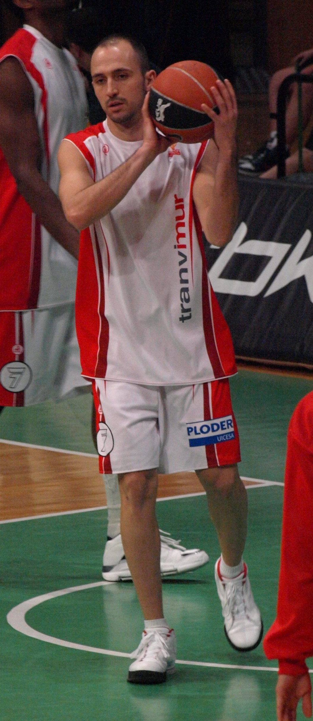 Pedro Robles con la camiseta del CB Murcia en el partido que enfrentó a su equipo ante el DKV Joventut en el Olímpico de Badalona correspondiente a la temporada regular de la liga ACB 2008/09